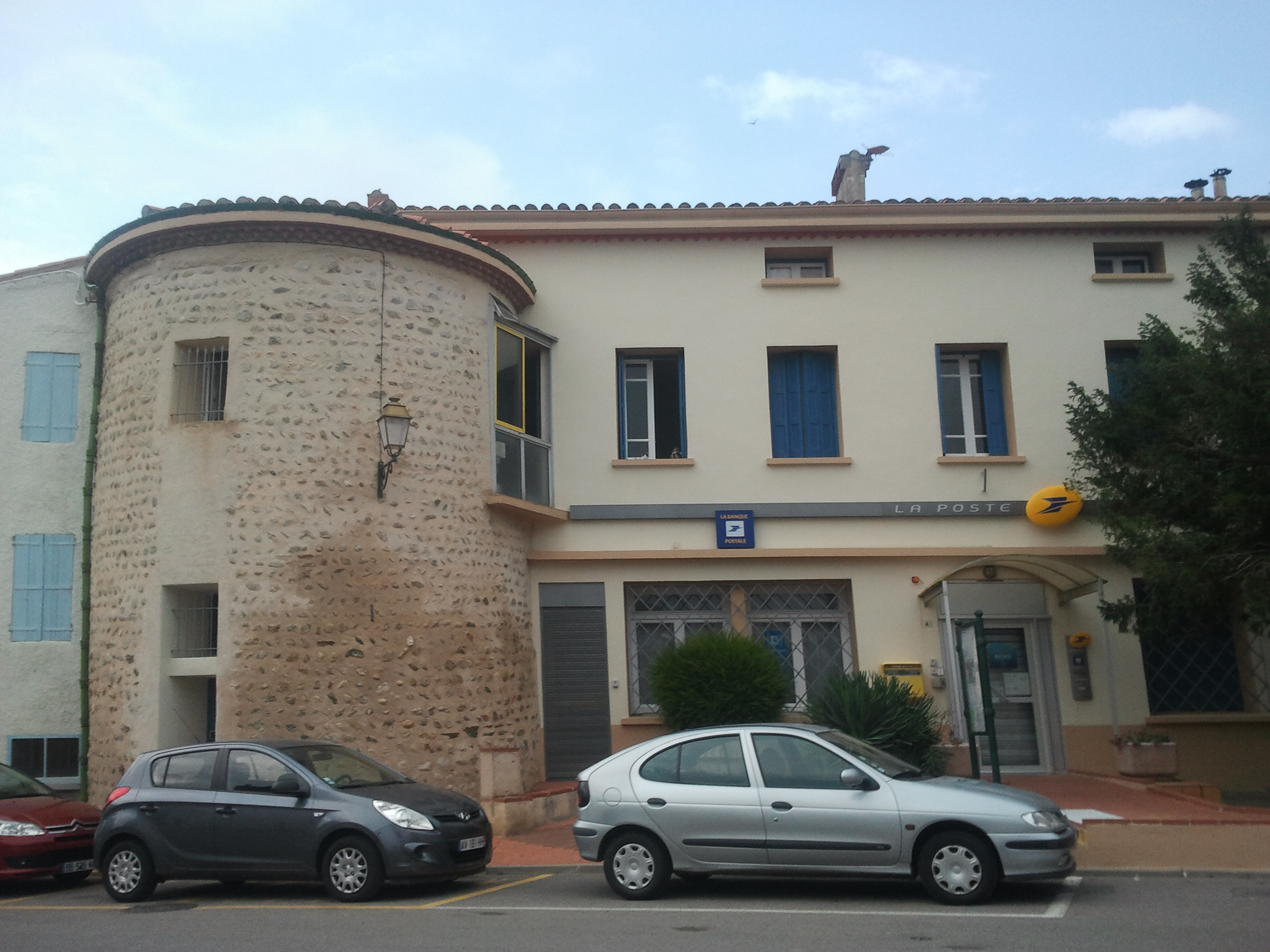 Ancienne tour et bureau de poste à Corneilla-la-Rivière